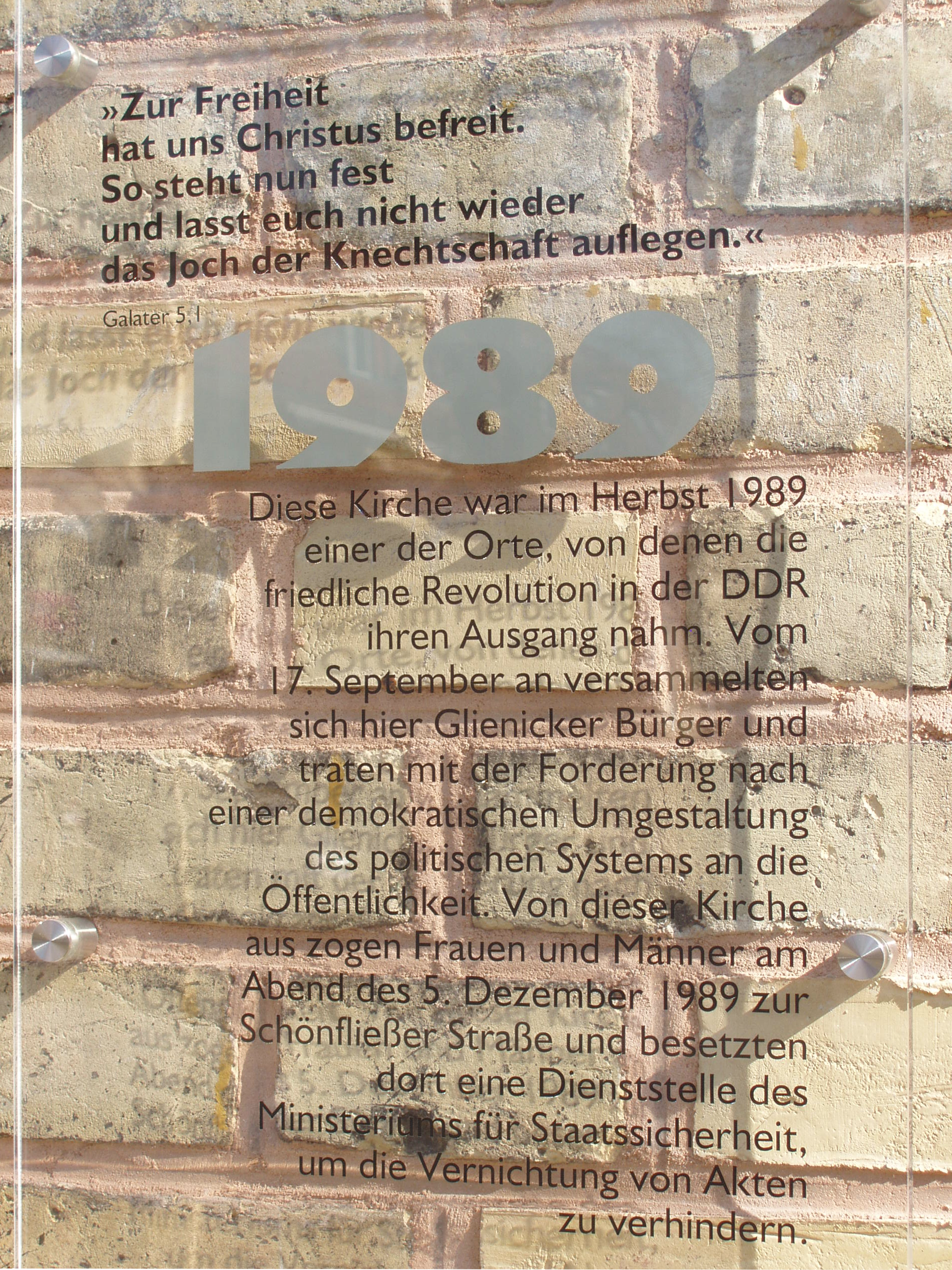 Evangelische Dorfkirche Glienicke (Nordbahn): Gedenktafel »1989« (Aufnahme 2014)